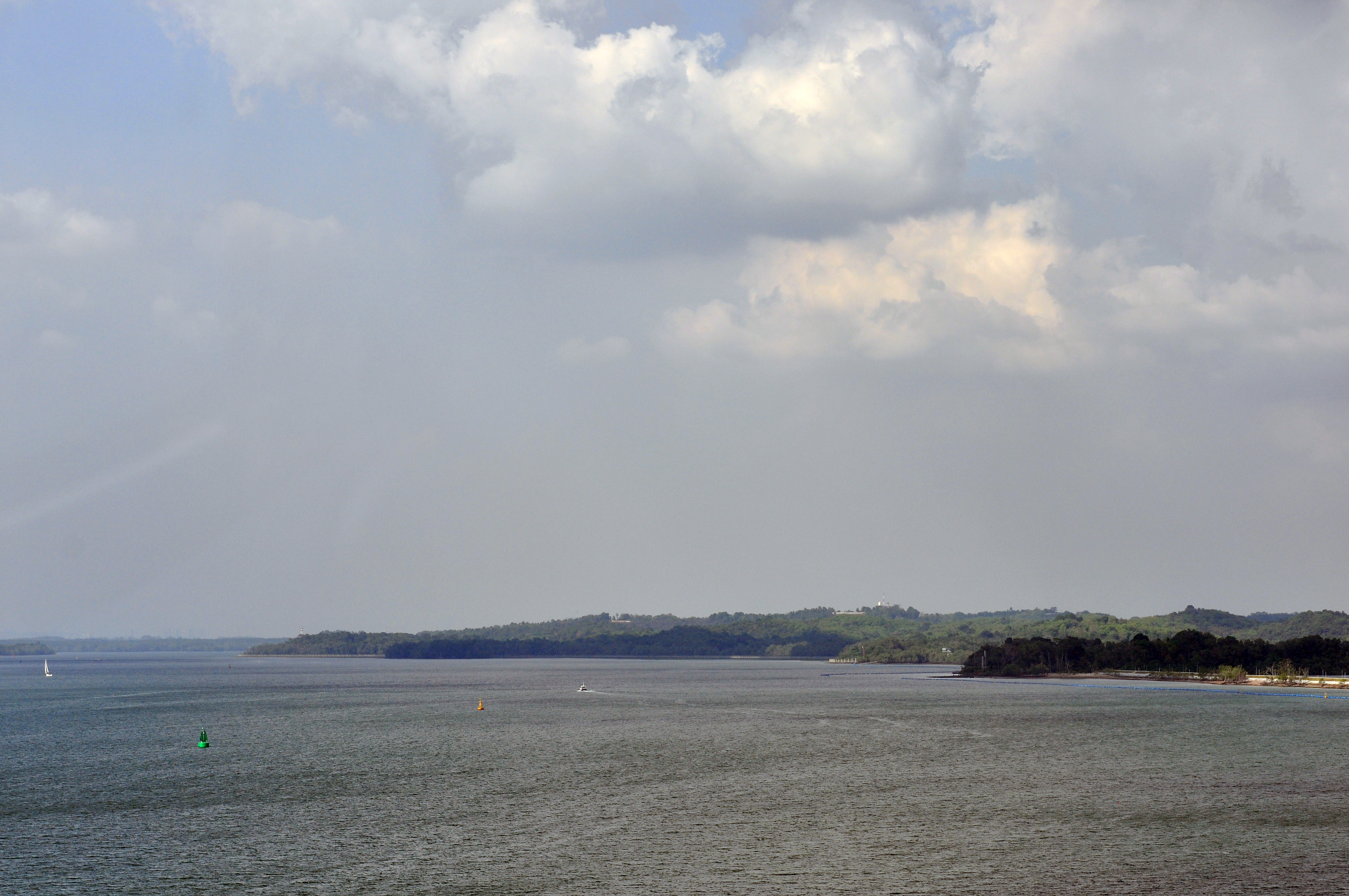 Singapore